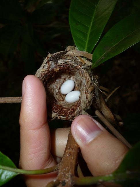 Nido de Chlorostilbon ricordii con dos huevos